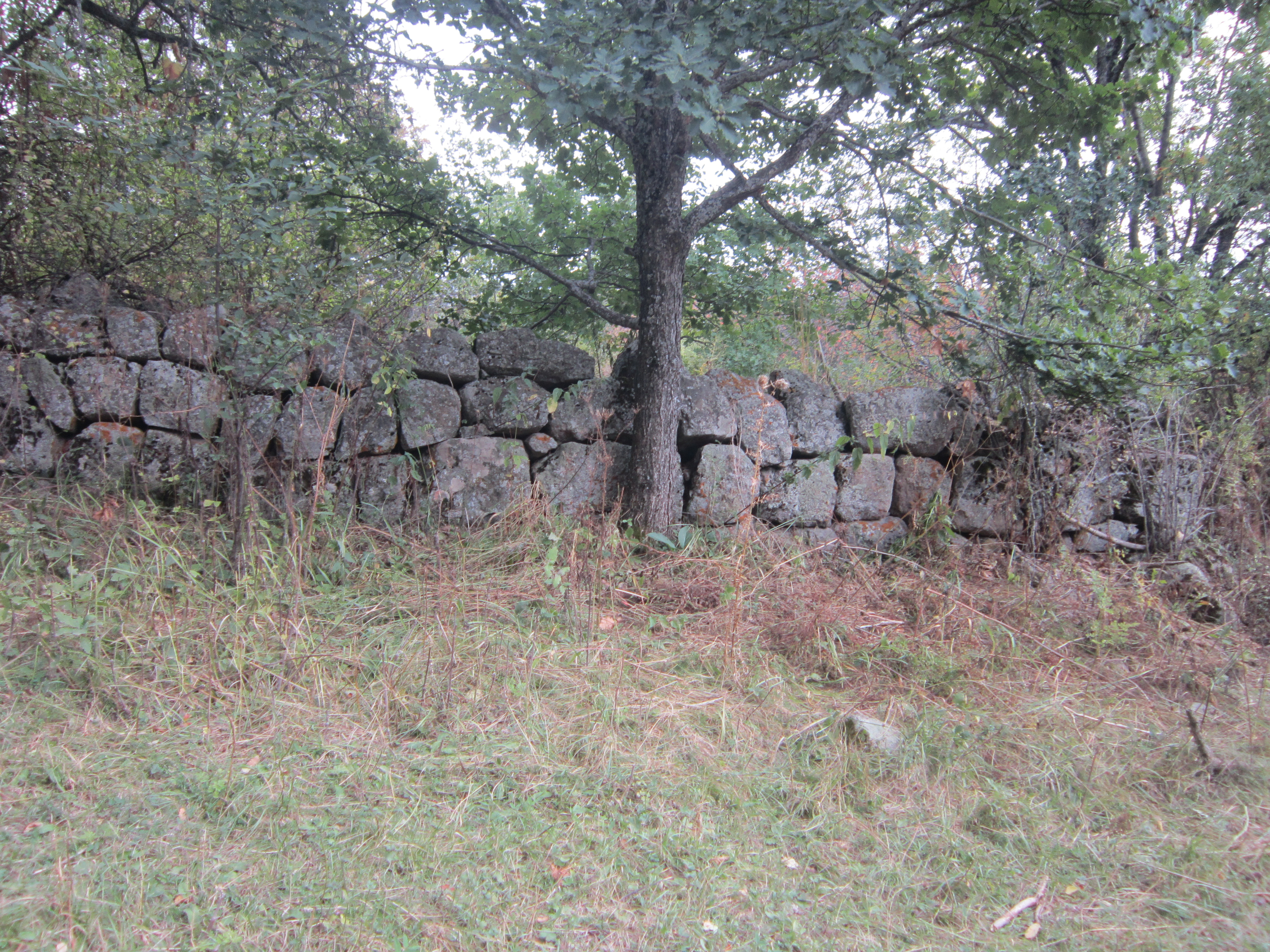 Վանական համալիր Թեժառույքի վանք (Գյուրջիքիլիսա, Թուխ Մանուկ) 45/11.3